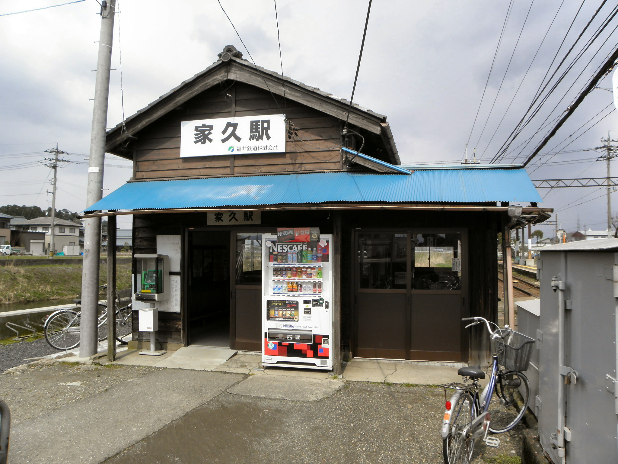 福井鉄道 家久駅